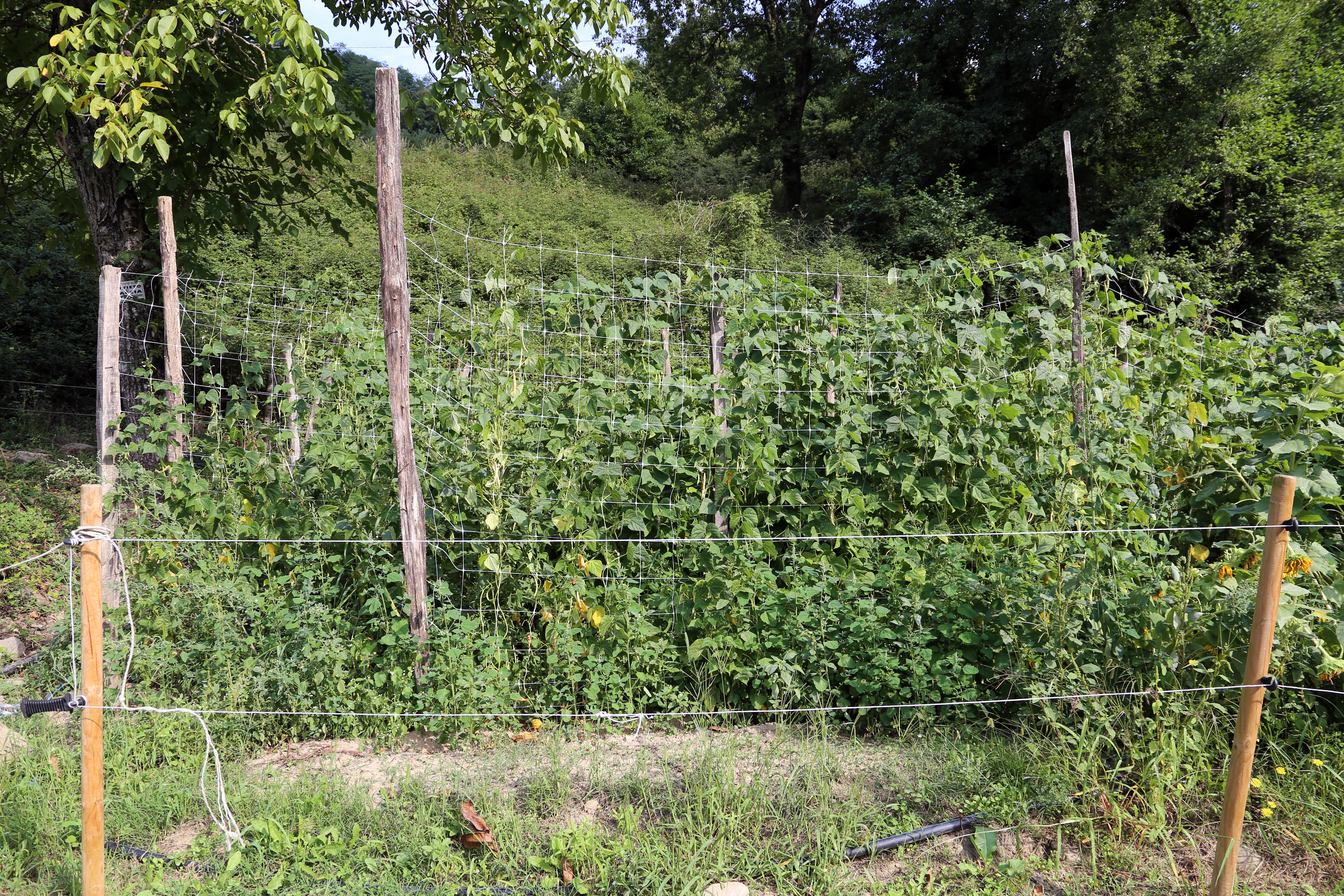 Sorana This is a photo of a monument which is part of cultural heritage of Italy.